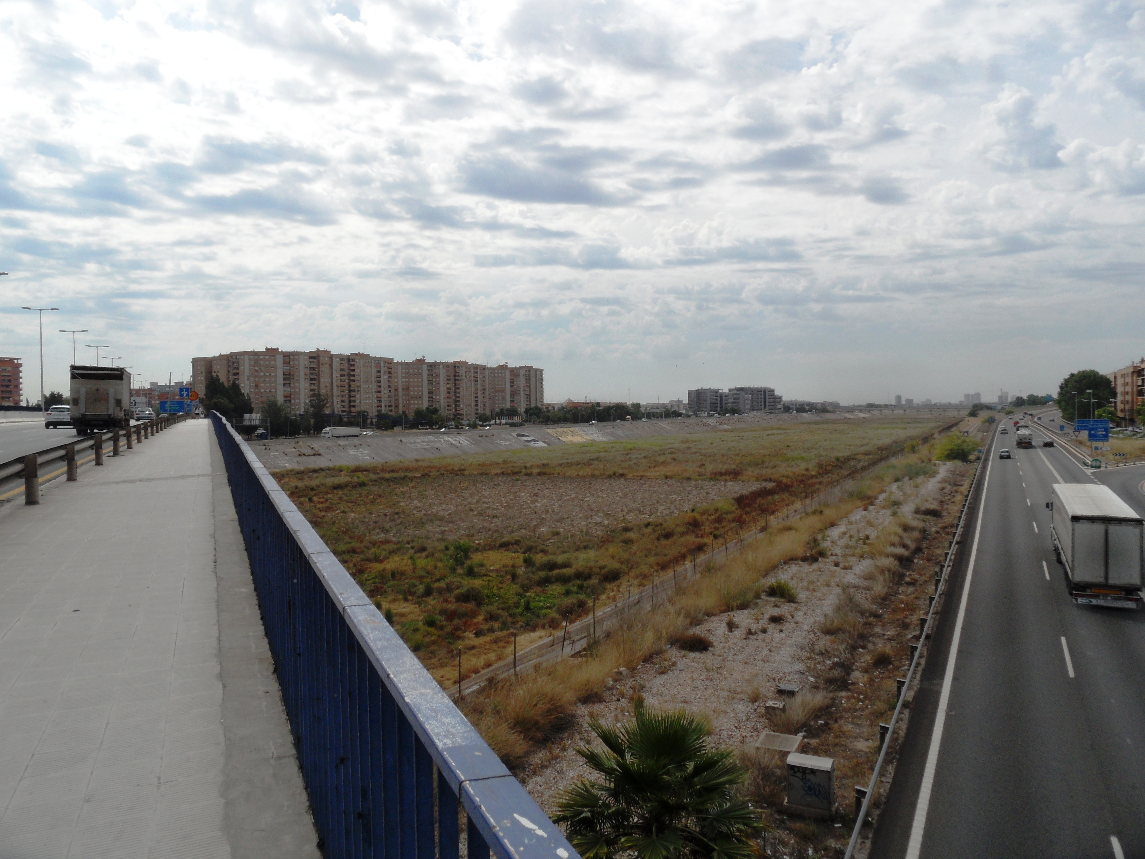 V-30 hacia el sur desde el Puente de Chirivella y nuevo cauce del Turia.